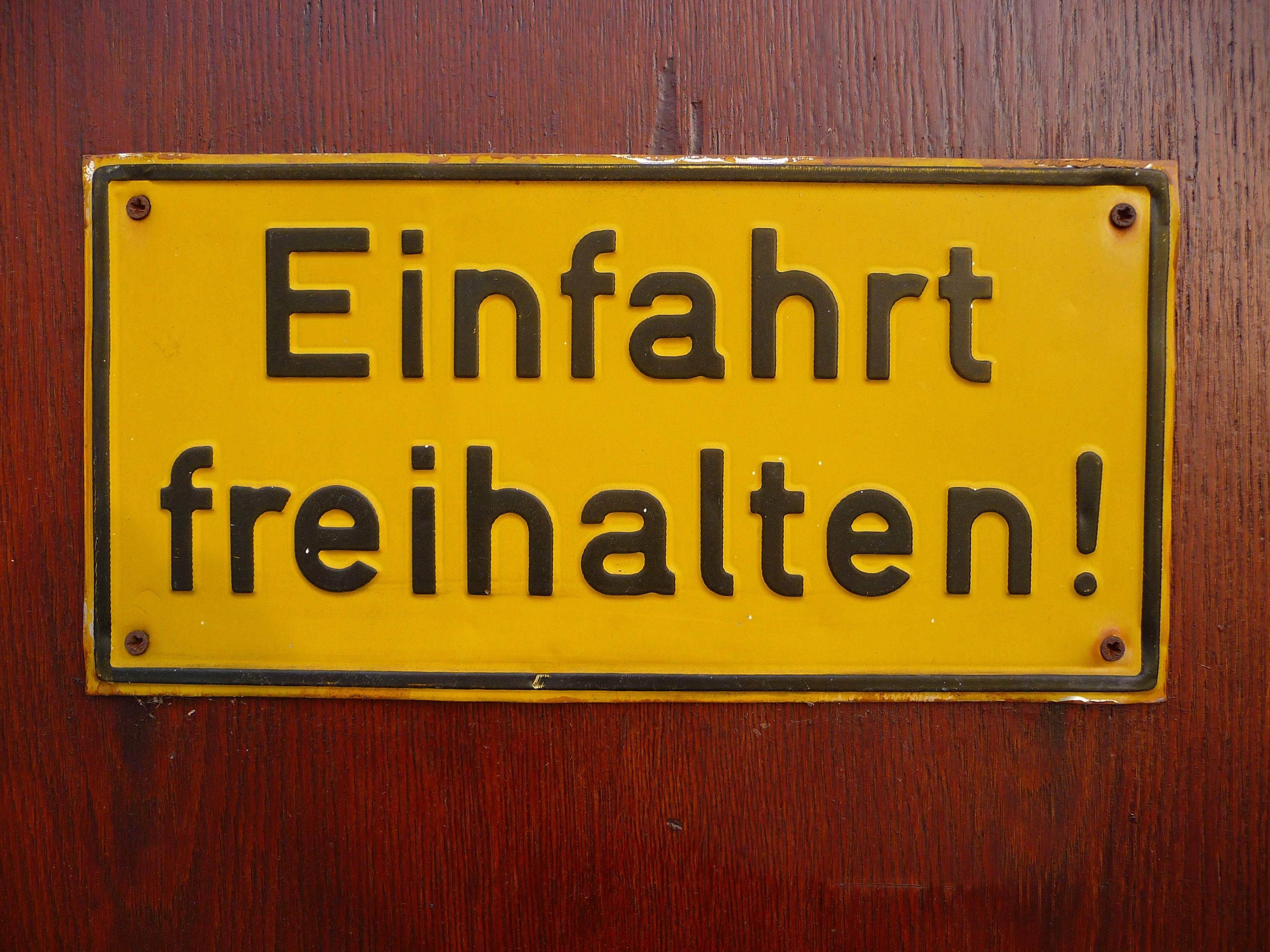 Hinweisschild an einem Garagentor in Baden-Württemberg (Deutschland)